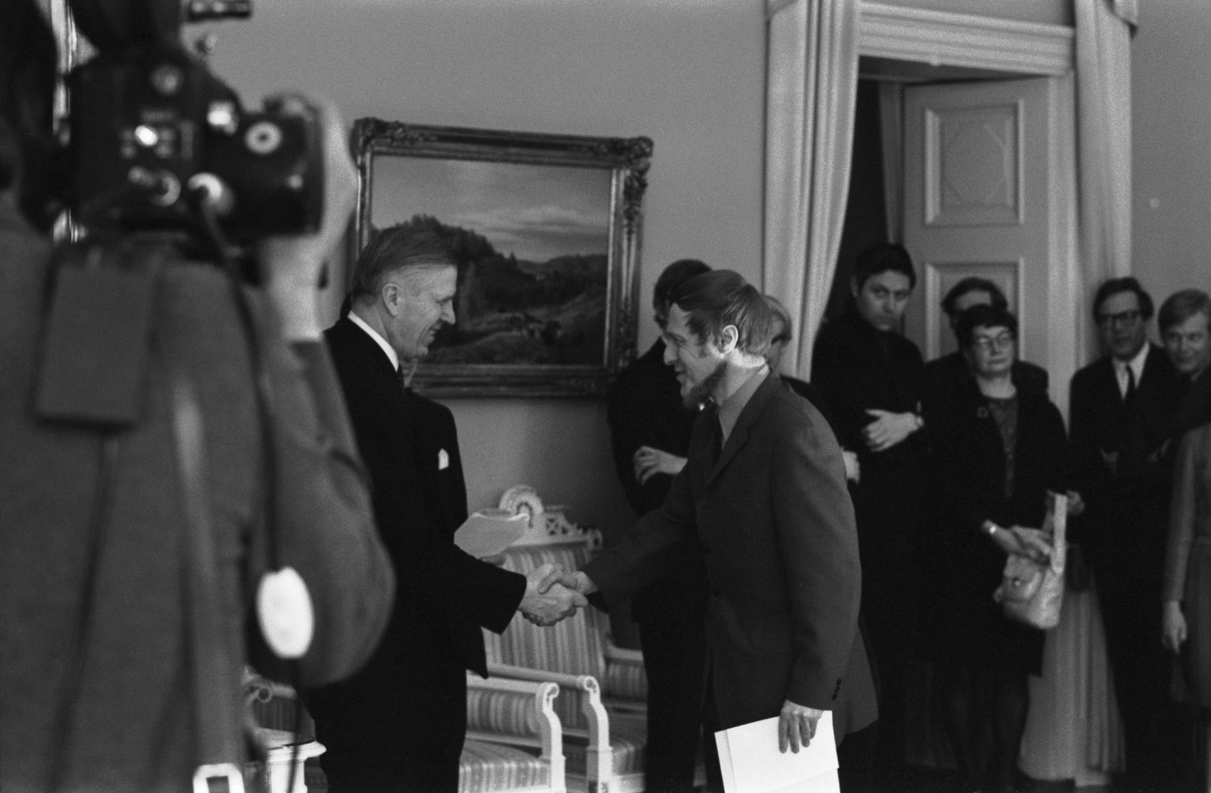 Valtion kamerataidetoimikunnan tilaisuus Valtioneuvoston juhlahuoneistossa Smolnassa. Elokuvaohjaaja Risto Jarva kättelemässä opetusministeri Johannes Virolaista. Taustalla näkyy Aito Mäkinen.